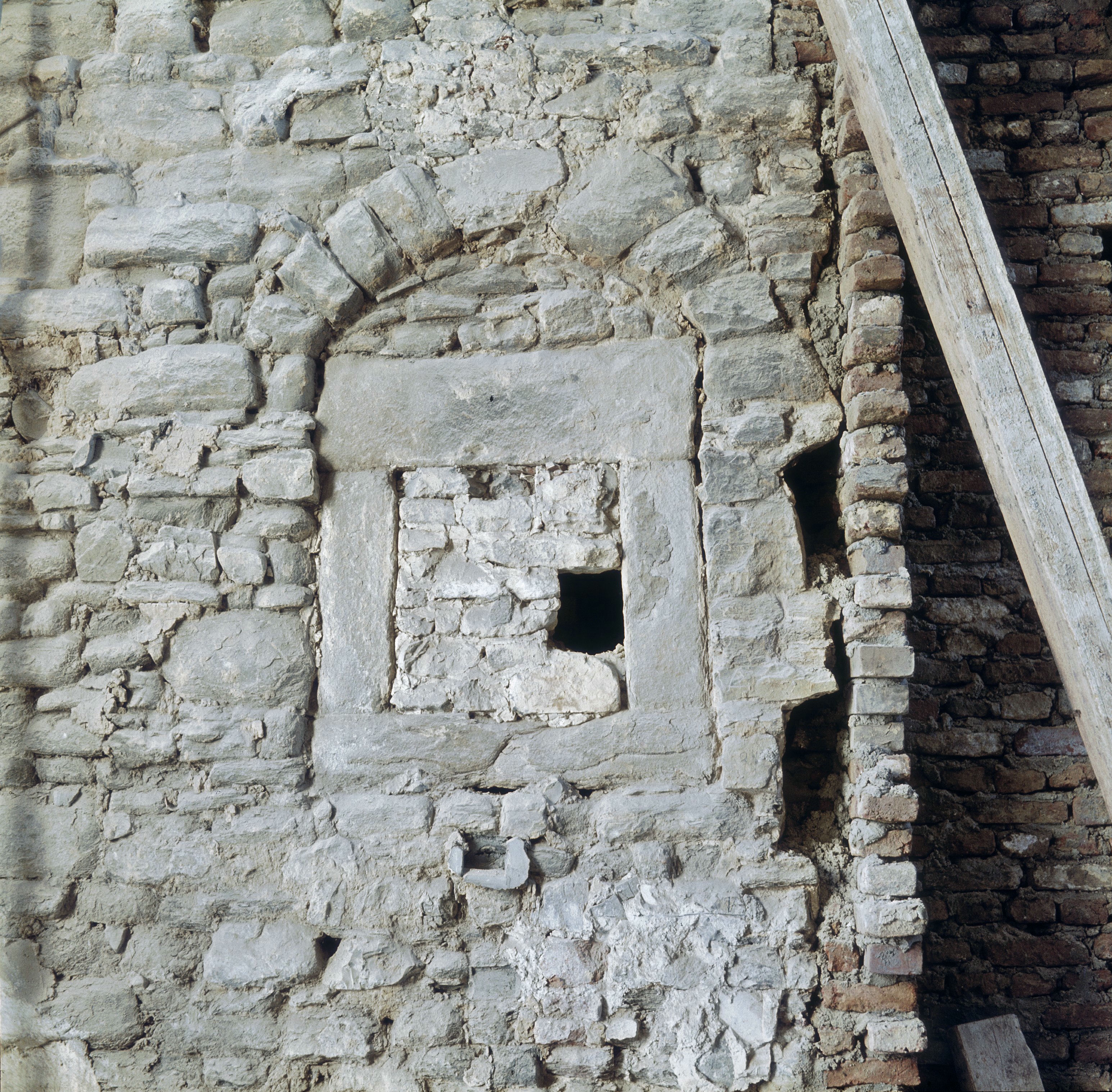 Detail buitenmuur van de voormalige Refugie van Sint-Gerlach (Stokstraat 55), gezien vanaf het interieur van nr. 53. Detail muur aan de zijde van nummer 53 met dicht gezet venster.